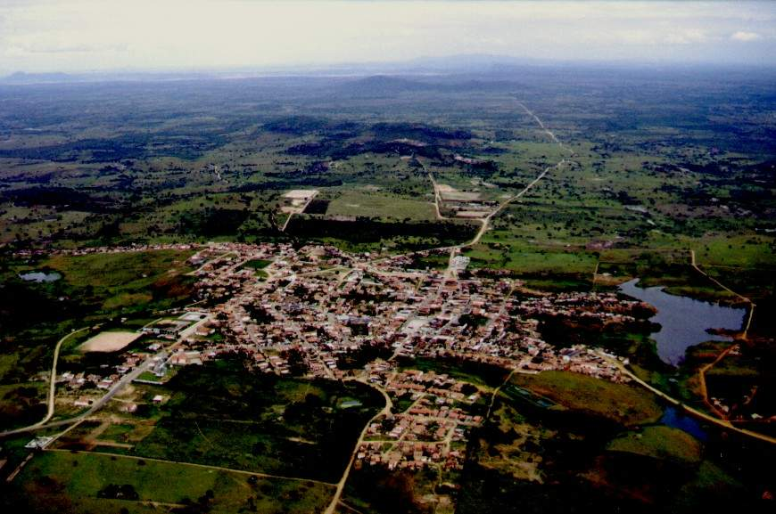 Foto panorâmica de Capela do Alto Alegre - Bahia - Brasil.